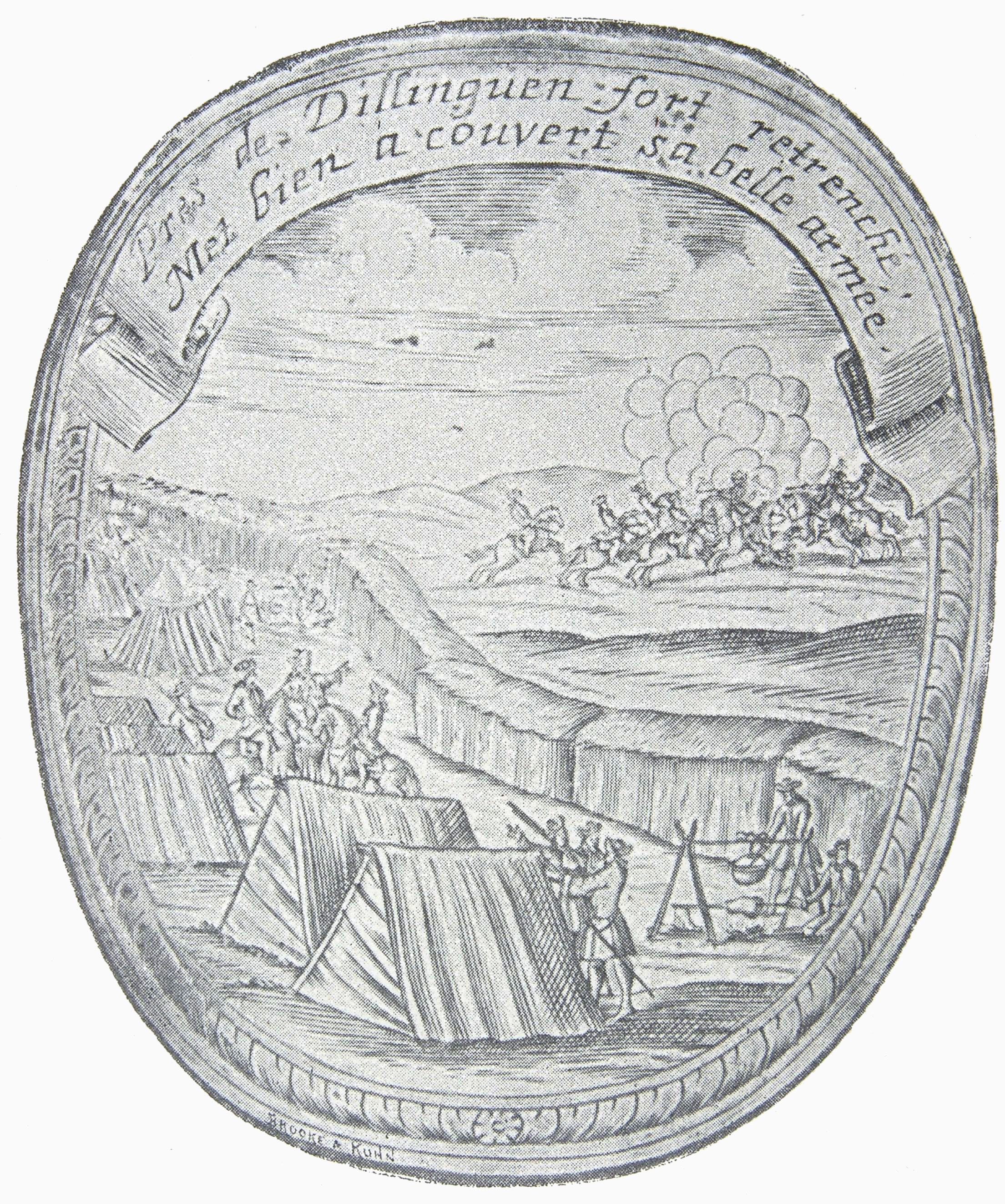 Gobelet d'André Falquet (Kunstgegenstand), Detail Seite 3.